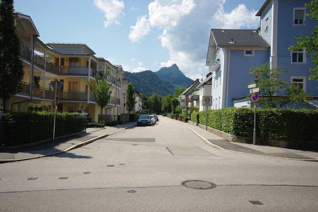 Friedrich-von-Schenk-Straße in 83435 Bad Reichenhall